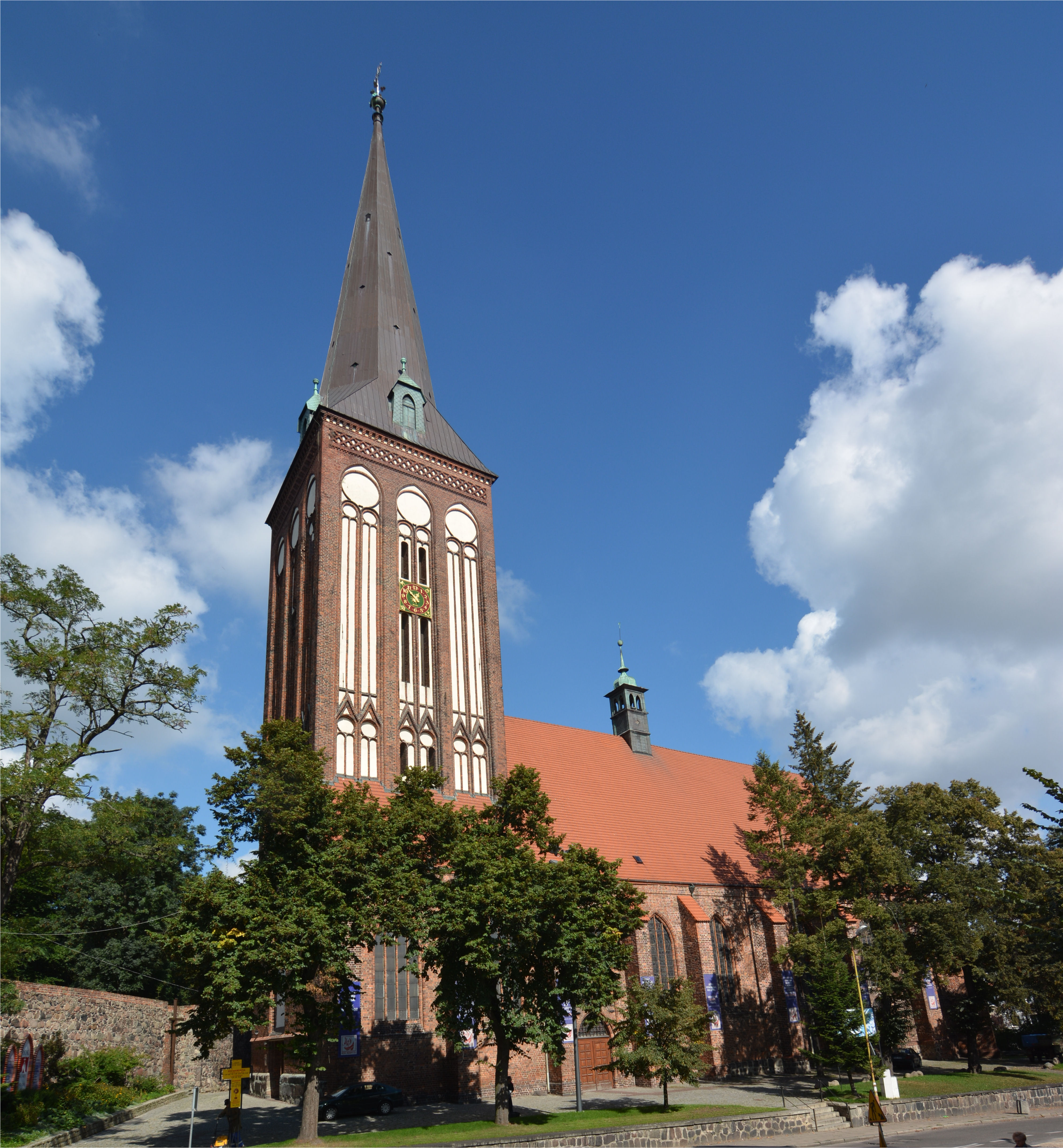 Stargard Szczeciński, kościół joannitów, ob par. p.w. św. Jana Chrzciciela, kon. XIII, 1 poł. XV, 1892